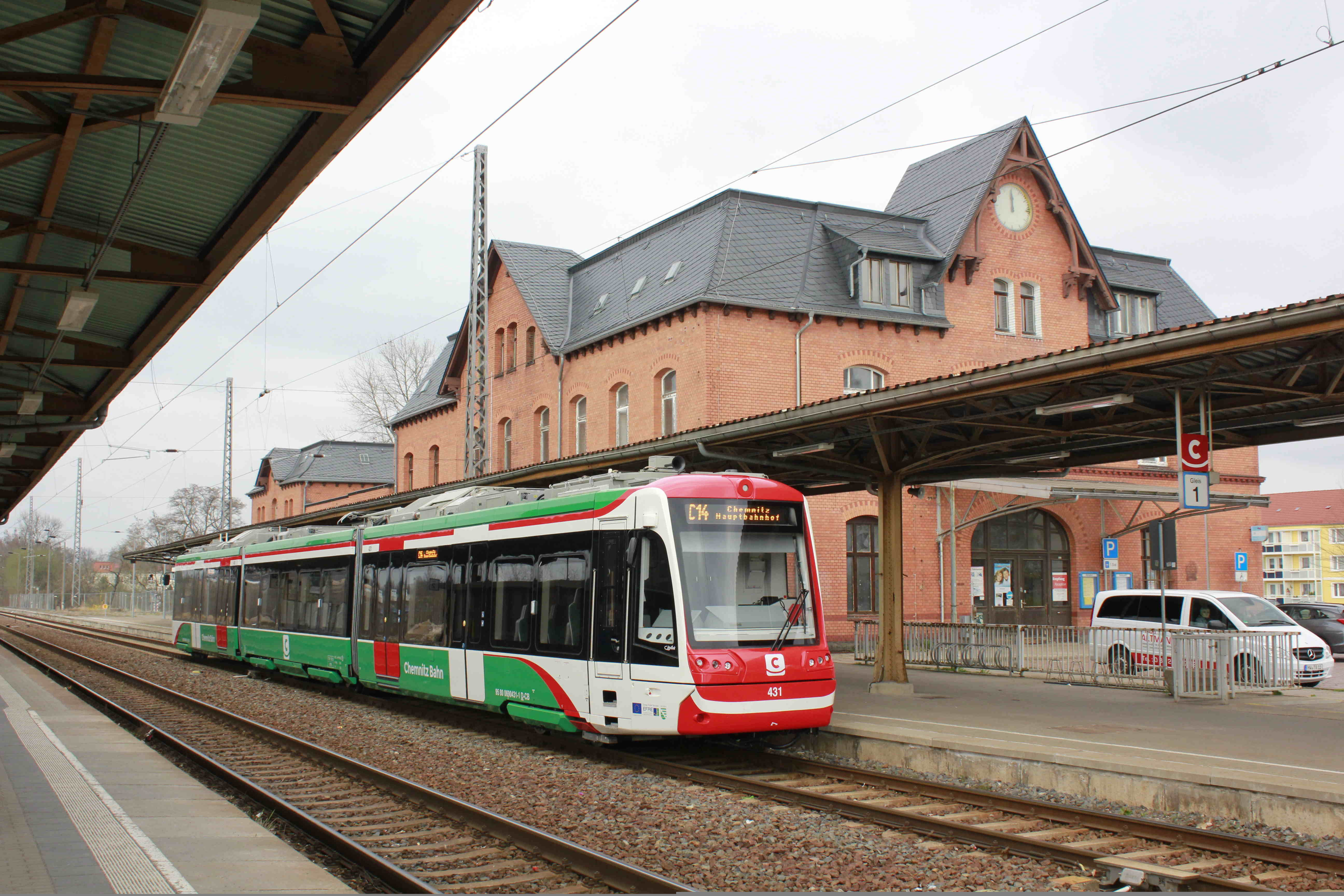 Ein Vossloh Citylink in Mittweida